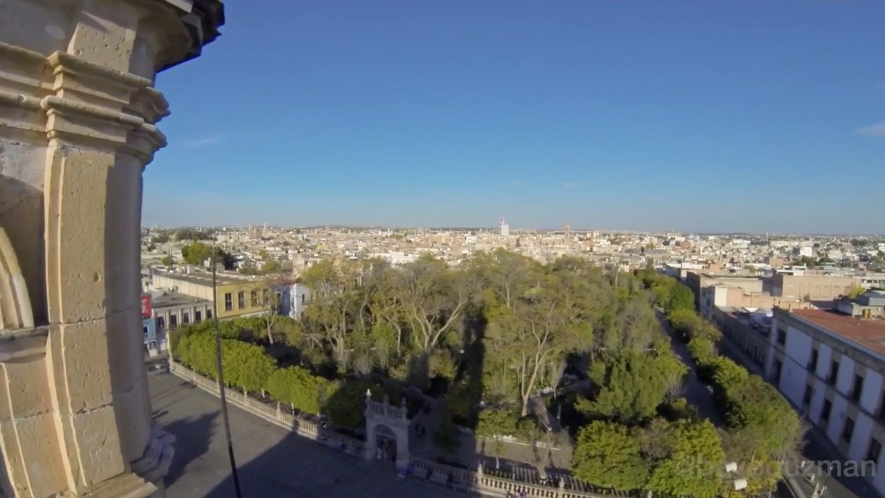 Jardín de San Marcos Aguascalientes